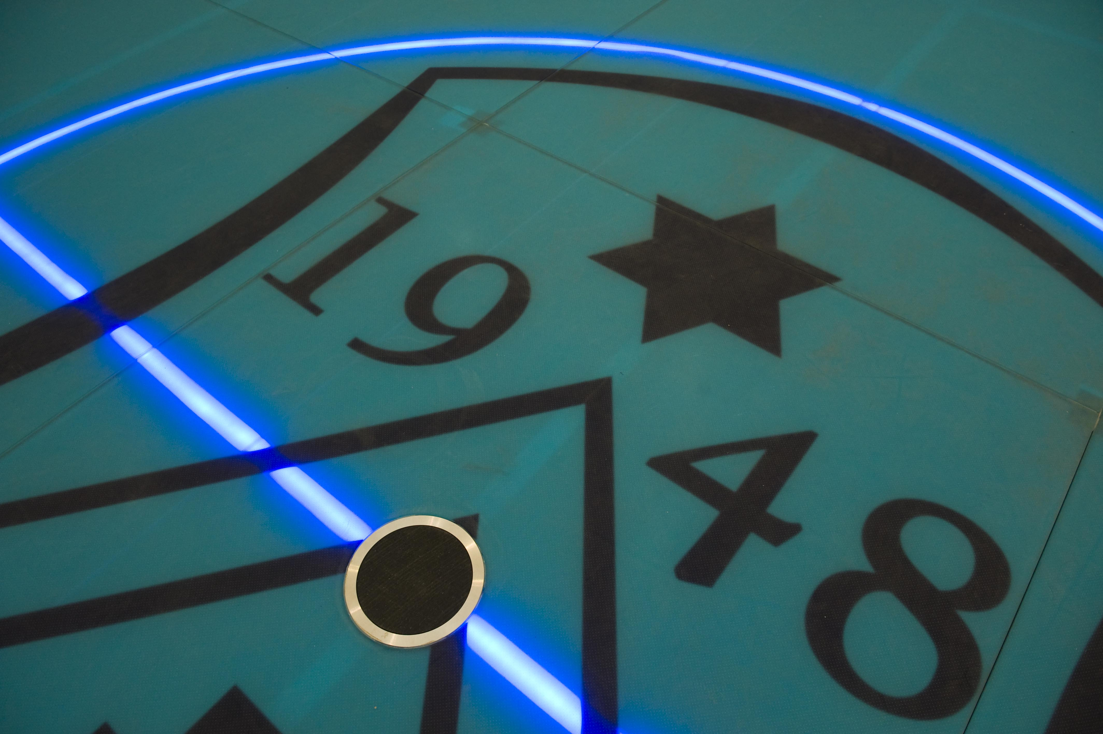 LED Beleuchtung im Glasboden